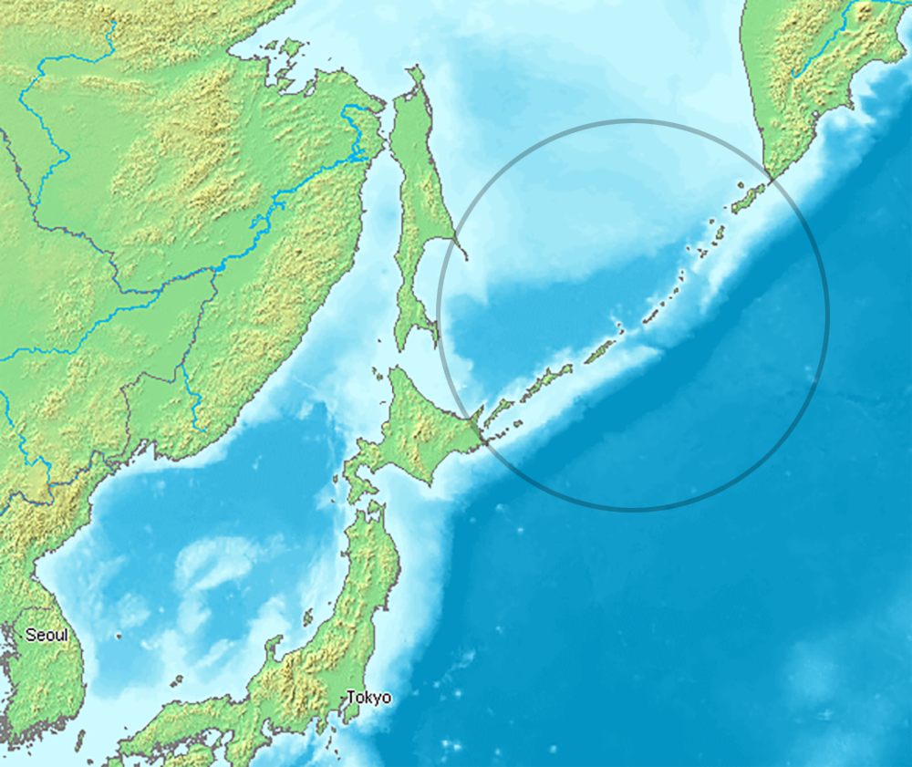 Kuril Islands